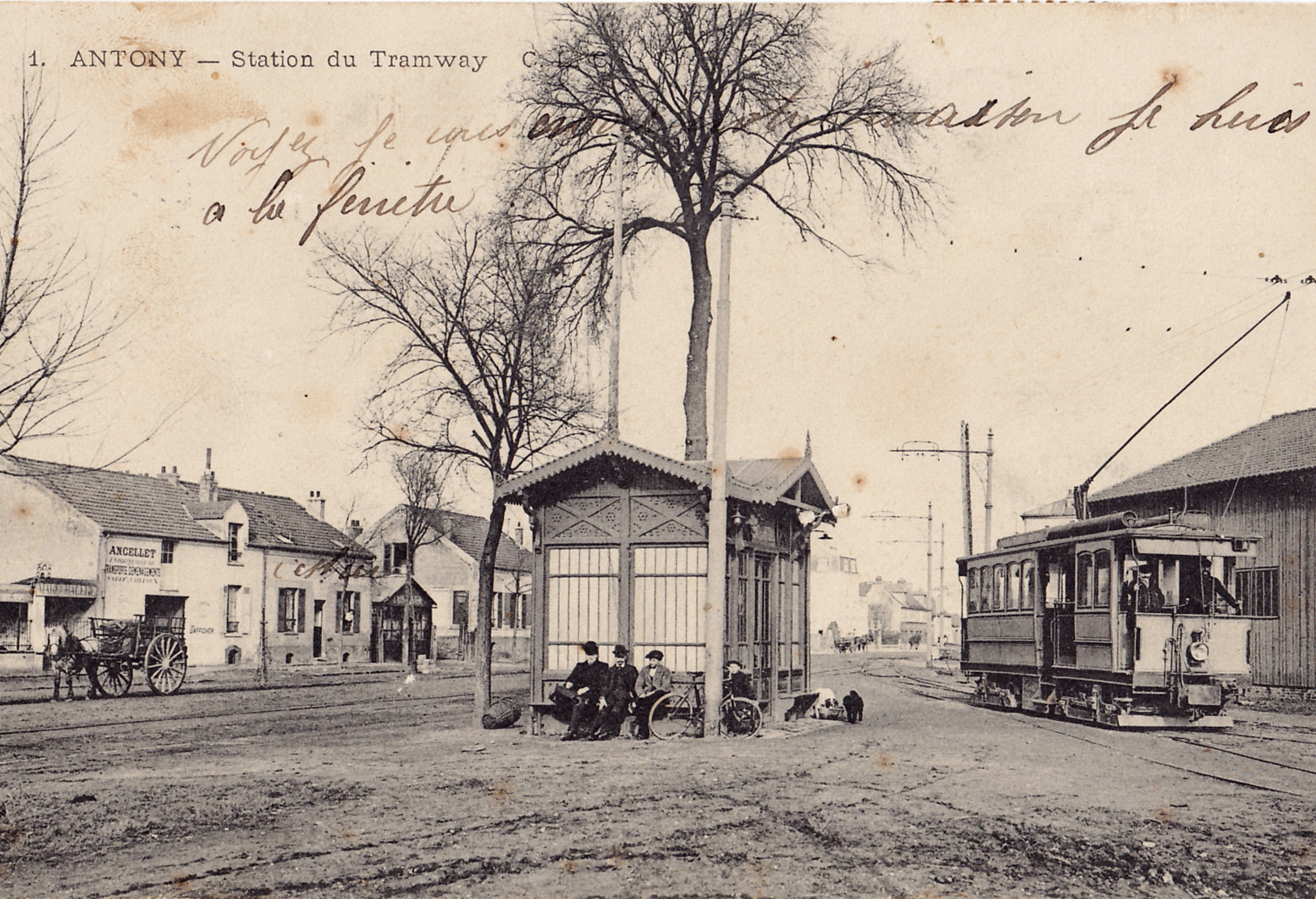 Carte postale ancienne éditée par CLC, n°1 :ANTONY - Station du Tramway